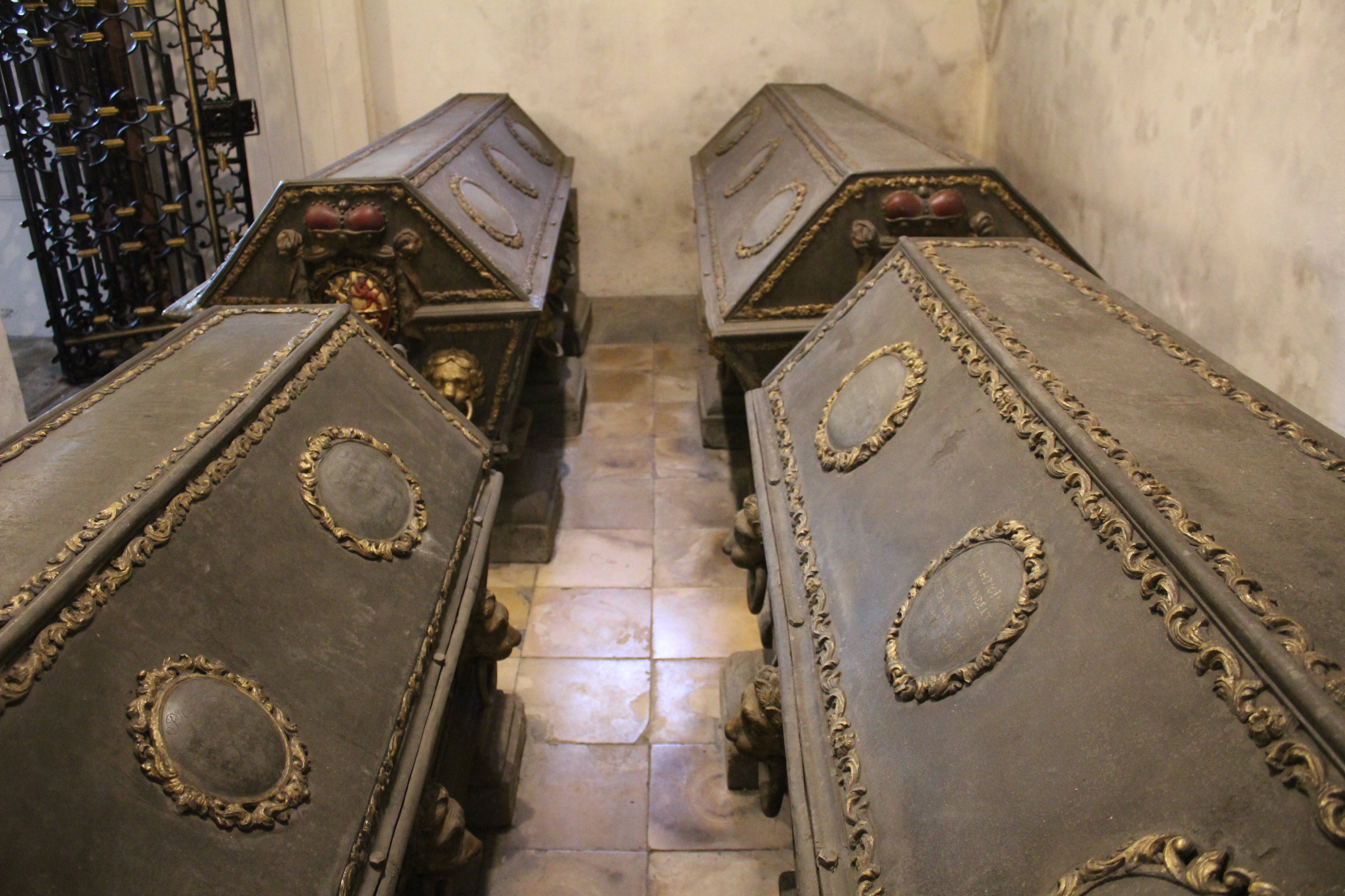 Evangelische Stadtkirche Dillenburg, Hessen, Deutschland